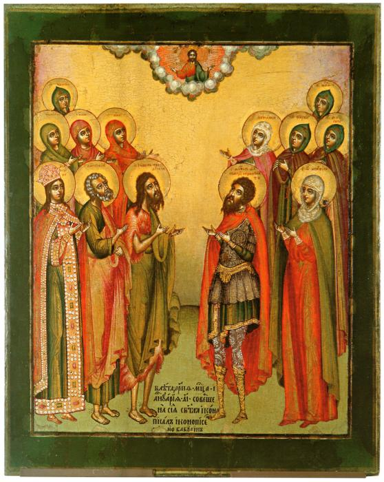 Избранные святые, в молении Христу Вседержителю. (Справа: мученики Федор Стратилат и Агафия, мученица Наталия, преподобная Мария, преподобномученица Феодосия и преподобная Марфа; слева: Иоанн Предтеча, апостол Петр, великомученица Екатерина, святая Анна, мученицы София и Татиана, преподобномученица Евдокия). 1681 г. ВСХМ. Инв. В-6300/236. 52,7 х 43 см. Происходит из собора Ризоположенского монастыря в Суздале. Пост. В музей в 1920-е гг. Реставрирована в 1961-1962 гг. в ГЦХРМ Т.А.Миловой. На поземе черная надпись: “В лета 7189 (1681) месяца ианнуария 11 дня совершена сия св(я)тла (так!) икона, писал иконописец …мо Бабухин” (Иконы Владимира 2006: кат. 89)